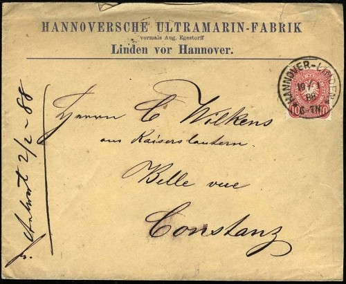 Am 19. Januar 1888 frankierte Briefumschlag mit dem Vordruck "Hannoversche Ultramarinfabrik, vorm. Aug. Egestorff, Linden vor Hannover", adressiert an "Herrn C. Wilkens aus Kaiserslautern, Belle vue, Constanz. Doch wer ist "Aug."? ...